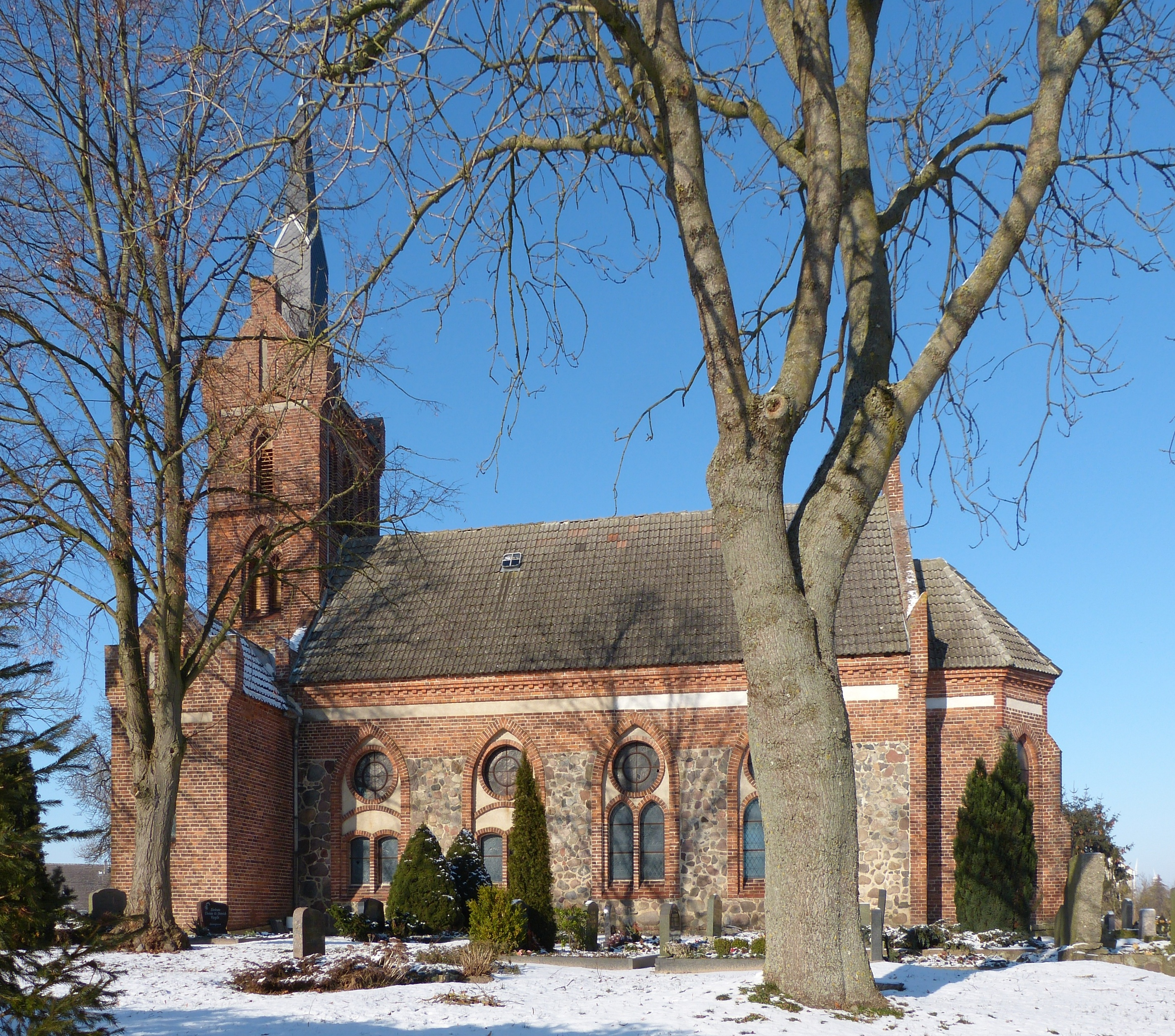 Kirche in Siedenbrünzow, Südseite